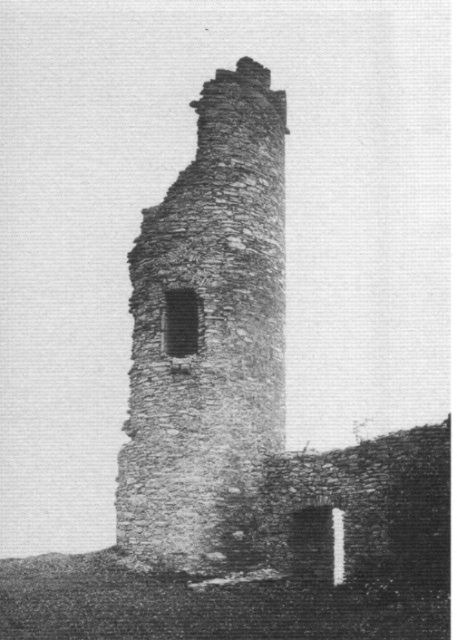 Nordturm der Ebersburg noch unrenoviert 1901 (Bildarchiv Foto Marburg Neg 811.426)